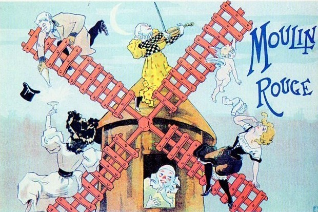 affiche du Moulin rouge, c. 1900